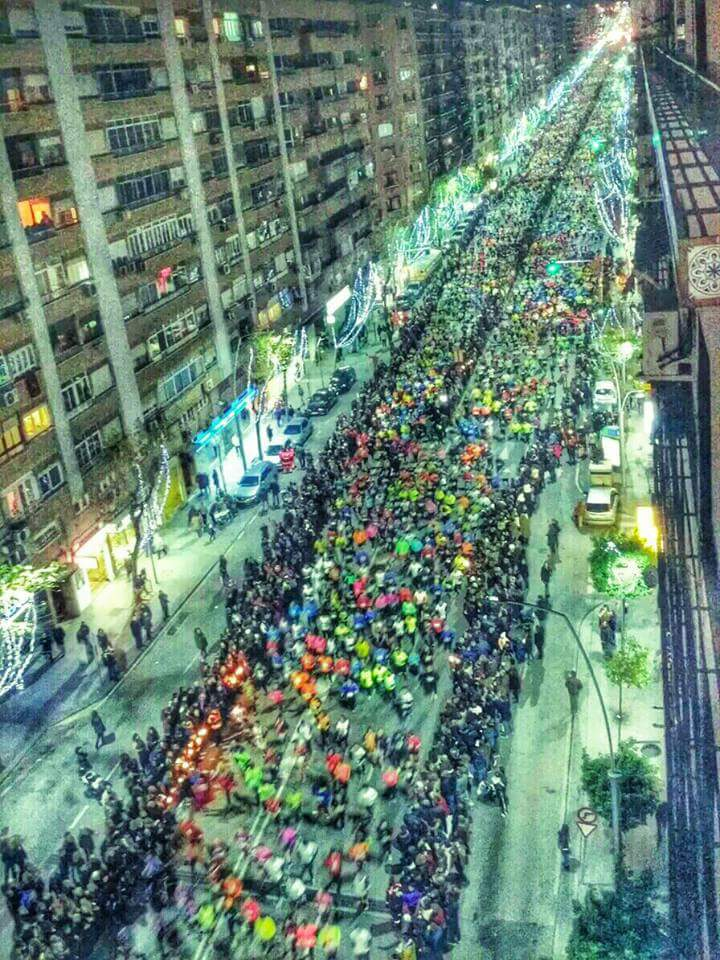 Маратон "Нощта на Сан Антон" се провежда на 17 януари.